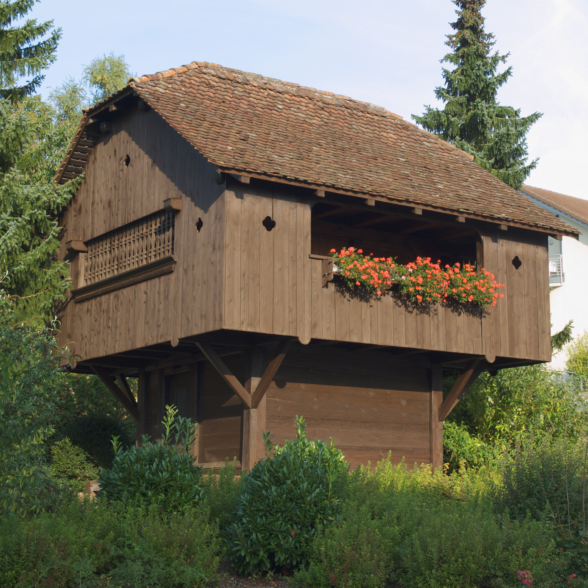 renovierter Speicher in Besenbühren